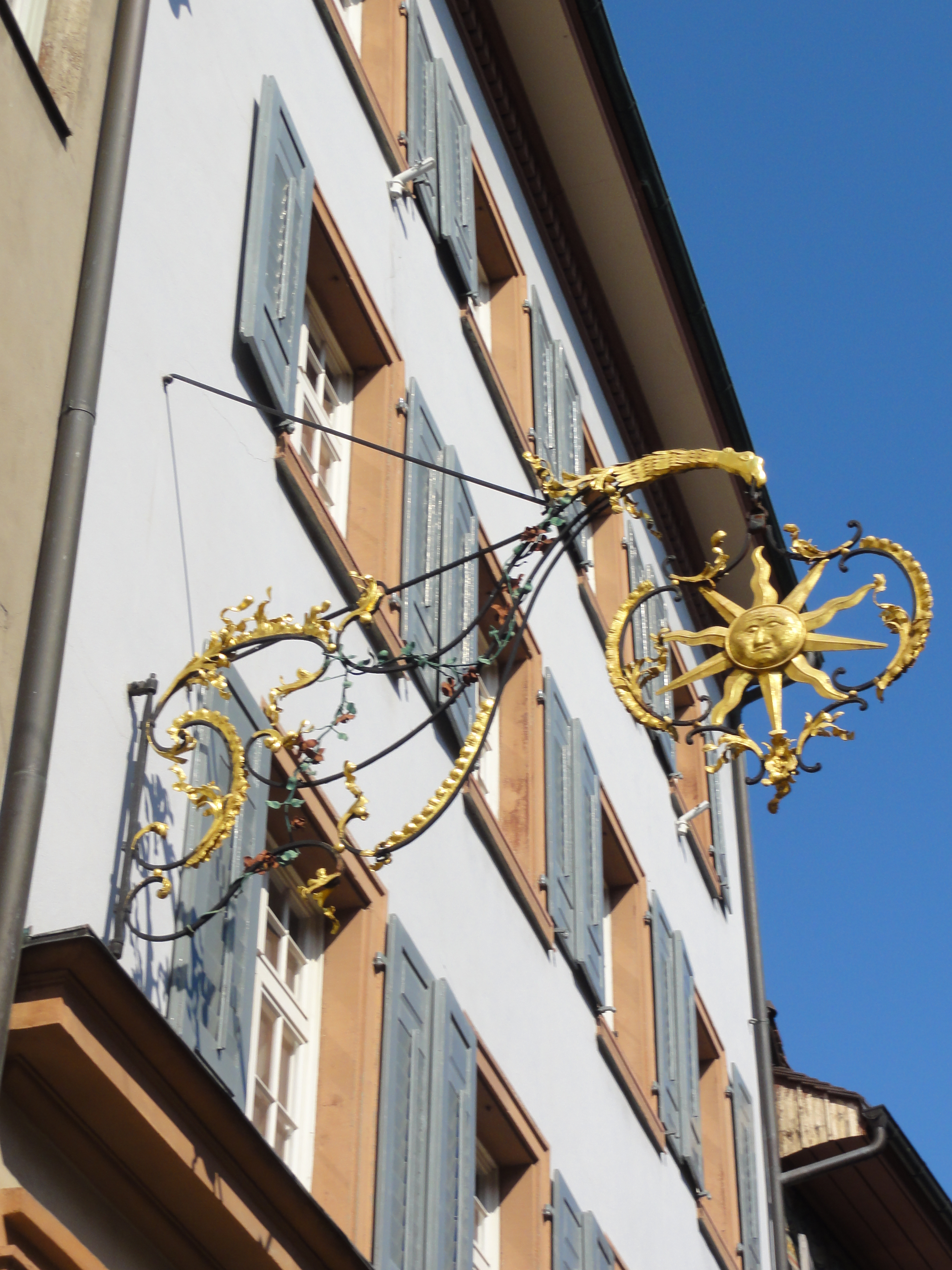 Fricktaler Museum in Rheinfelden, Aargau — Nasenschild mit einer Sonne GPS data may be inaccurate. EXIF data regarding date and time may be inaccurate.